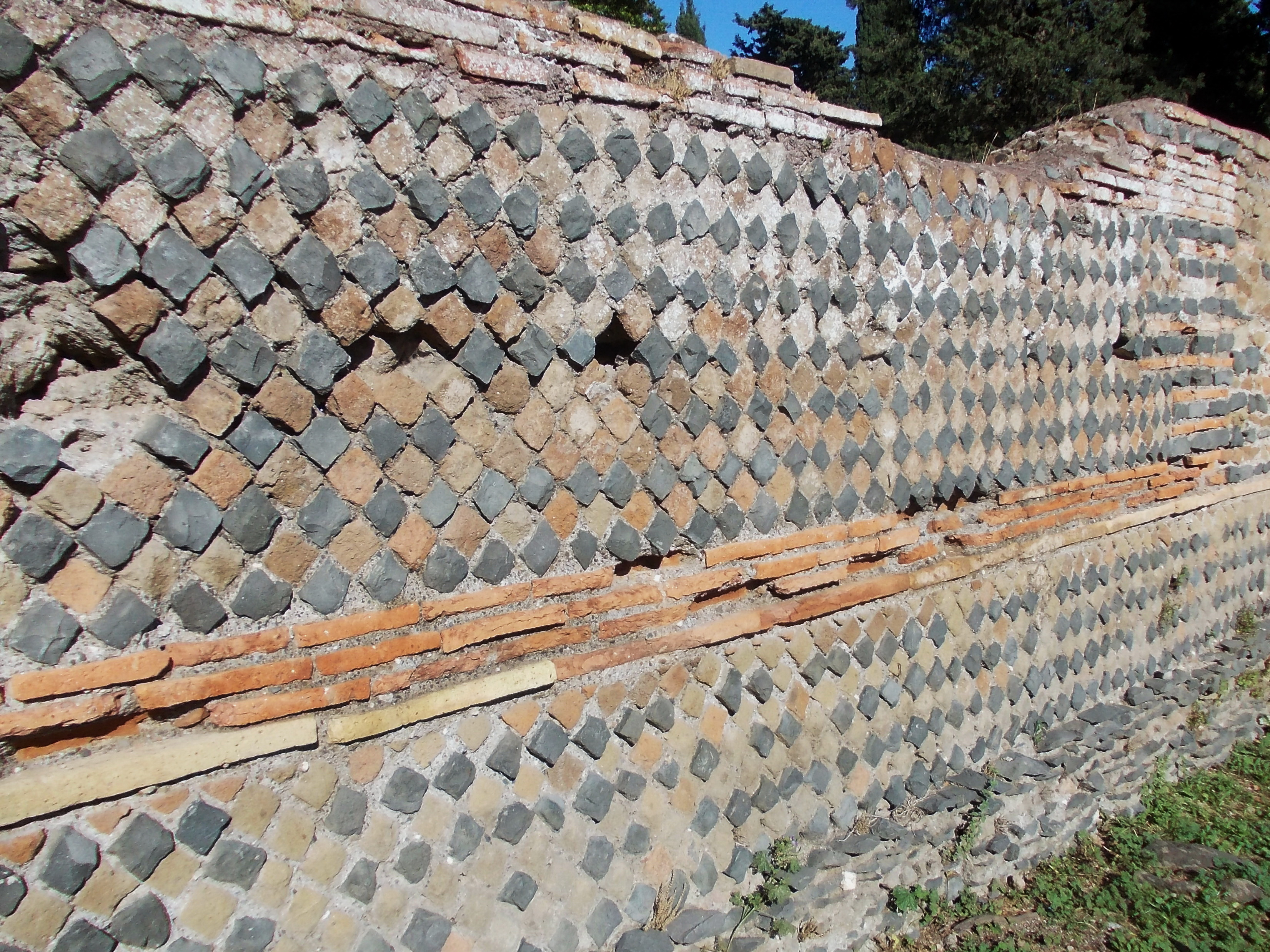 Opus vittatum reticulatum polychrome, Ostia Antica